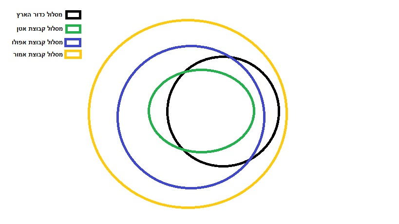 מסלולו של האסטרואיד האמורי